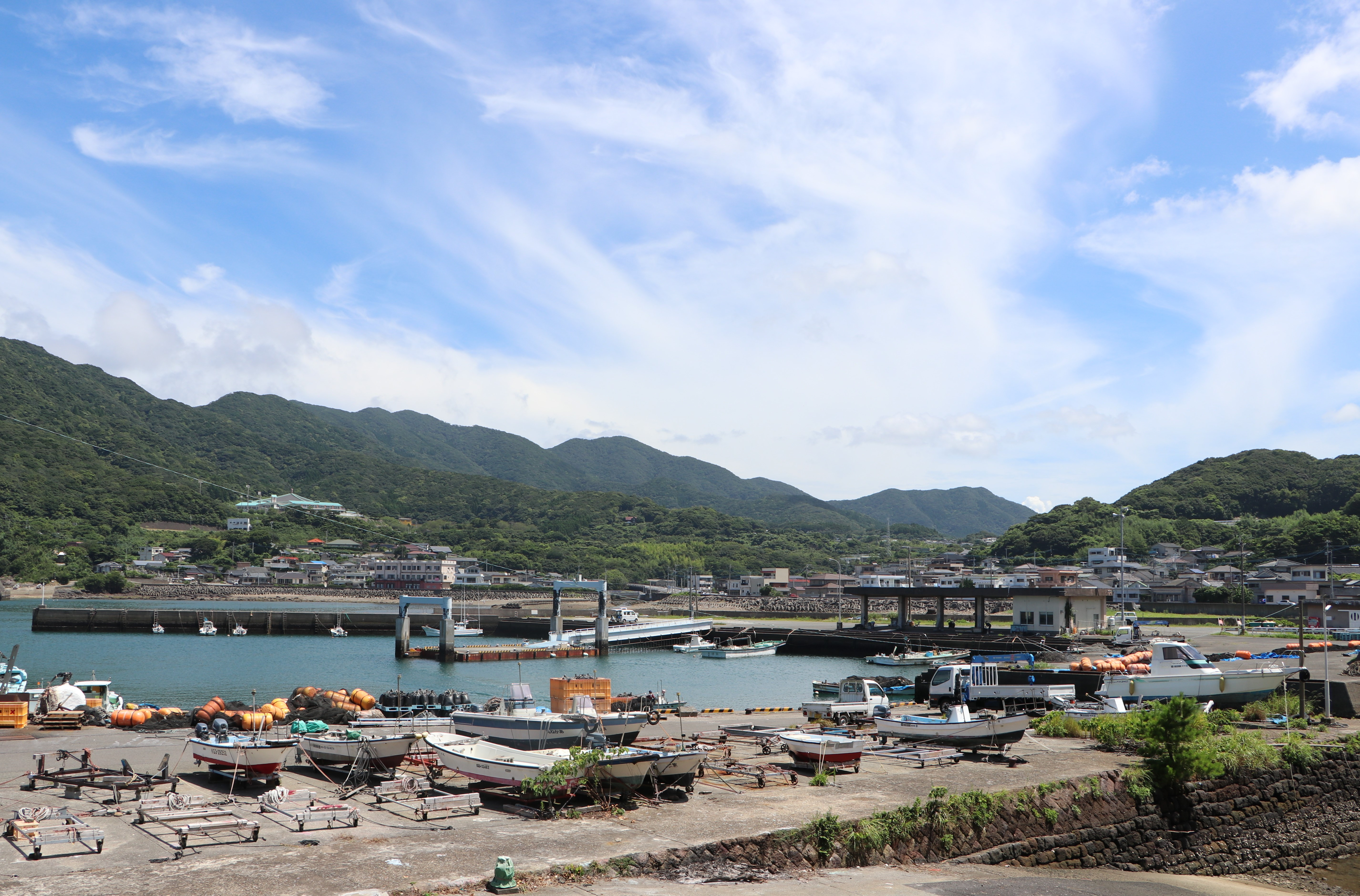 坊泊港（泊地区）の漁港と集落